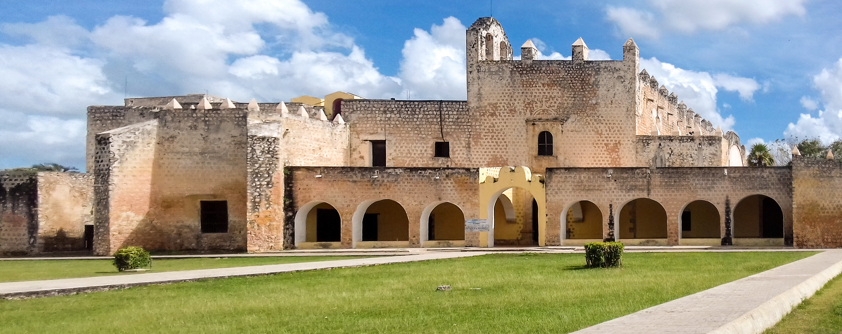 Convento de San Bernardino Valladolid Yucatán